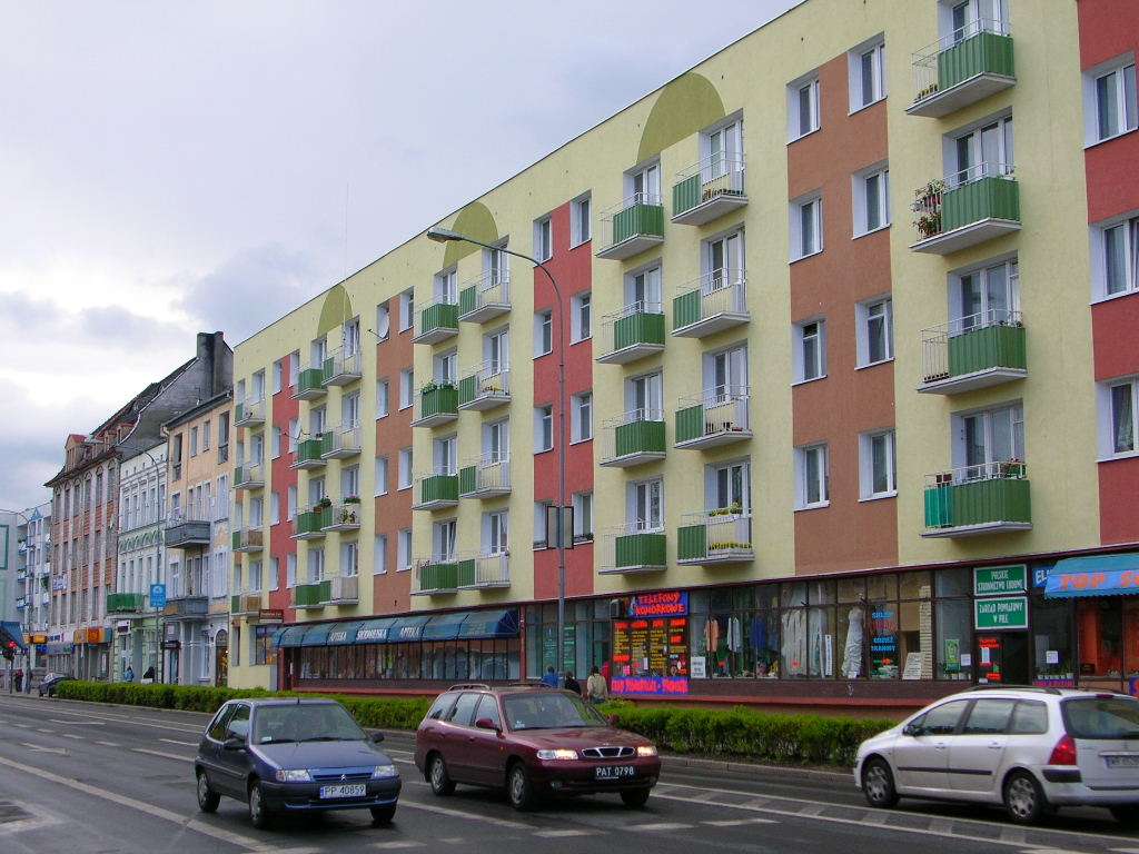 Piła - ul. 3 Maja Autor - Bartek Wawraszko